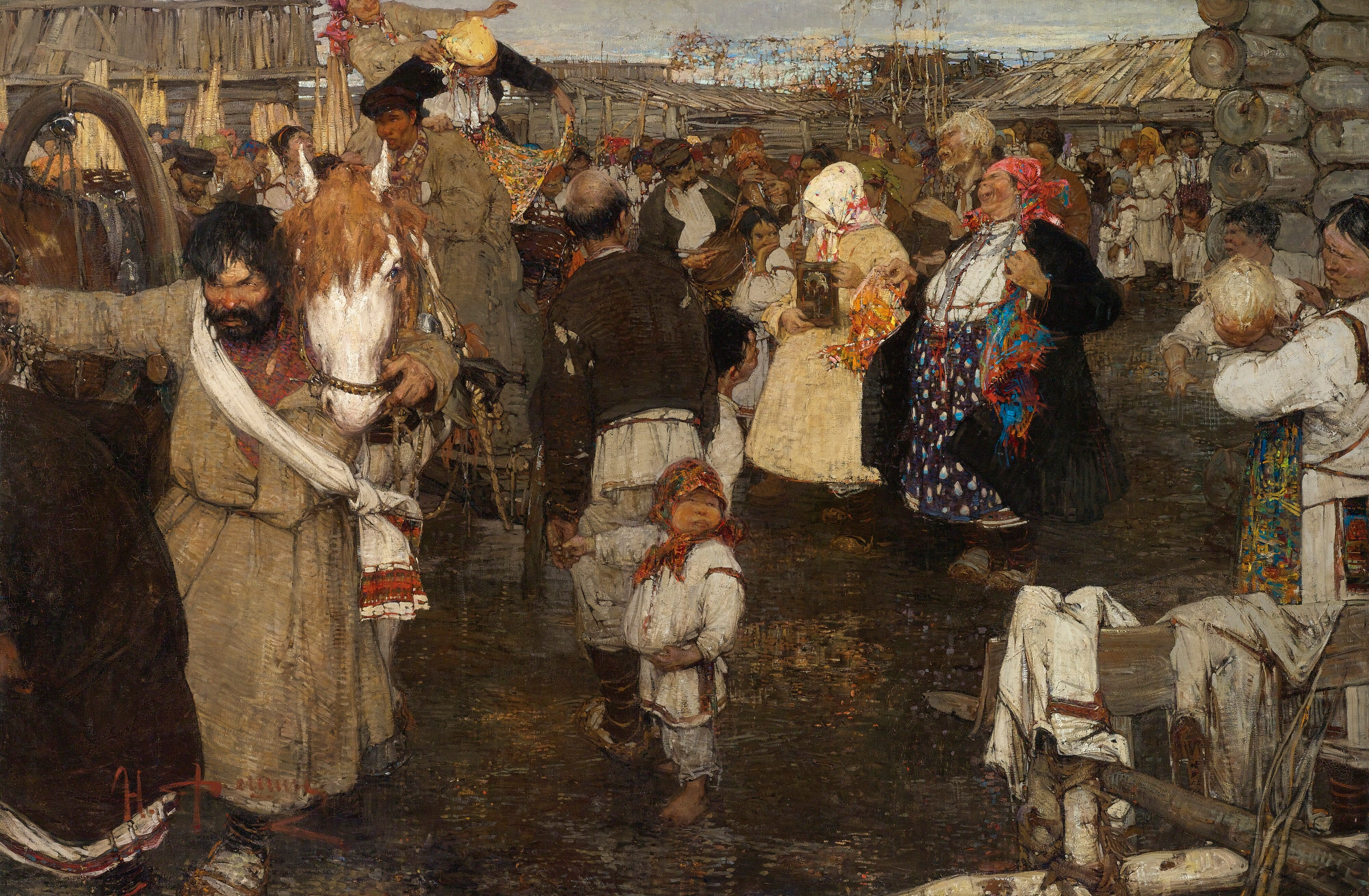 "Черемисская свадьба" - новаторская работа Н.И. Фешина